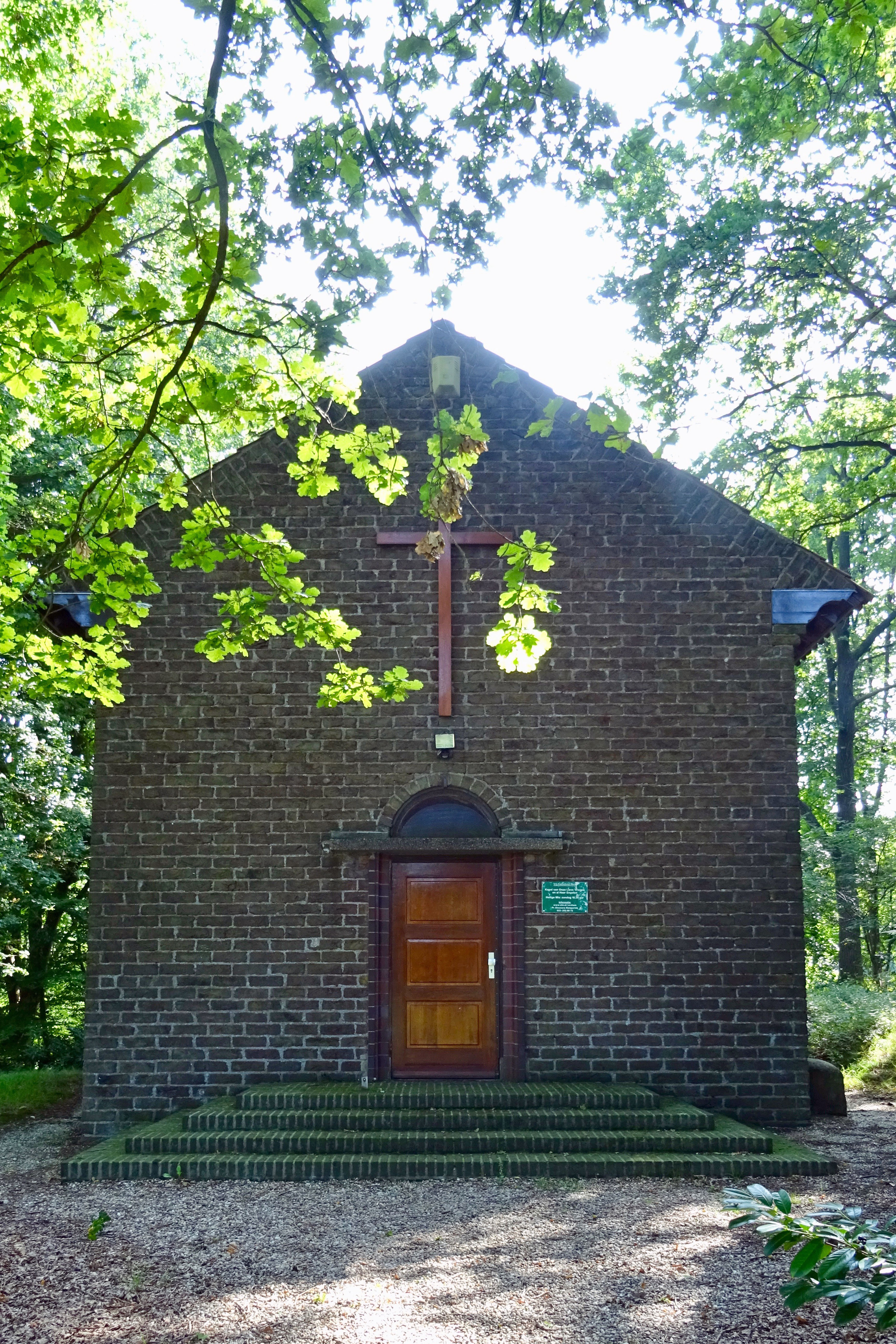 Vrij-Katholieke Kerk (Onze Lieve Vrouwe en al Haar Engelen) op de heuvel nabij de Braamberg te Arnhem